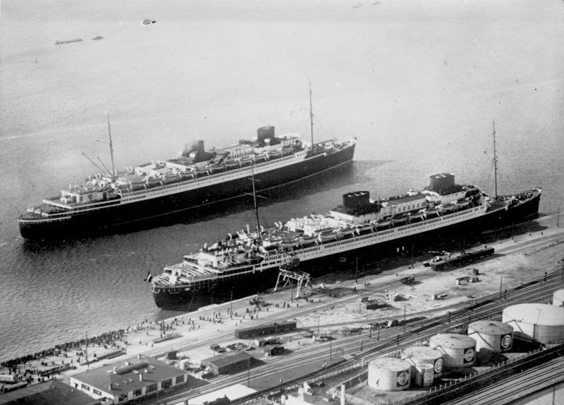 Deutschlands größte Schiffe "Europa" und "Bremen" - am Pier des Norddeutschen Lloyds in Bremerhaven vom Flugzeug aus gesehen. Vorn die "Europa", welche am 19. März ihre Jungfernreise antreten wird, dahinter die "Bremen".